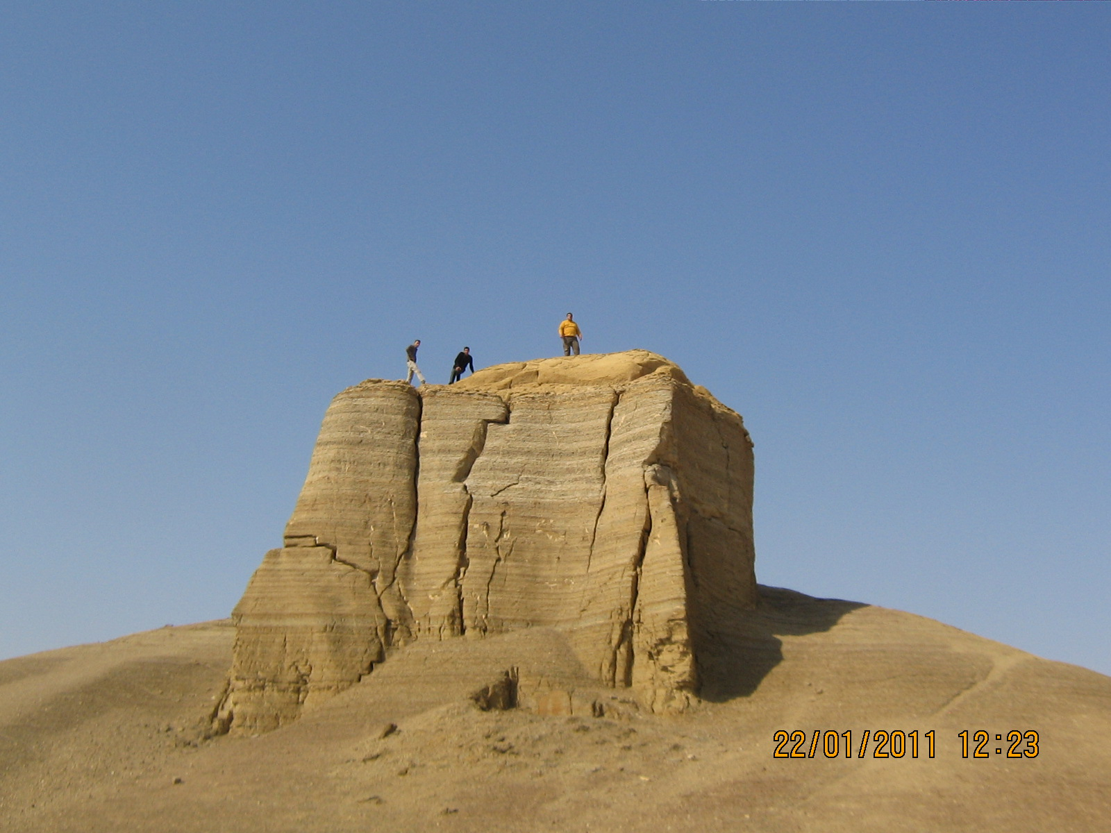 مصرى: مجموعه من الأصدقاء تقوم برحله الى محمية قارون بمحافظة الفيوم وهى مكان جيولوجى قديم جدا يعود الى عصور جيولوجيه من ملايين السنين , المكان به تكوينات ذات أشكال غريبه من نحت الطبيعه , كما يوجد به بحيرة قارون وهى من أقدم البحيرات الطبيعيه فى العالم , مع ممارسة رياضة التسلق This is an image with the theme "Play" from: Egypt